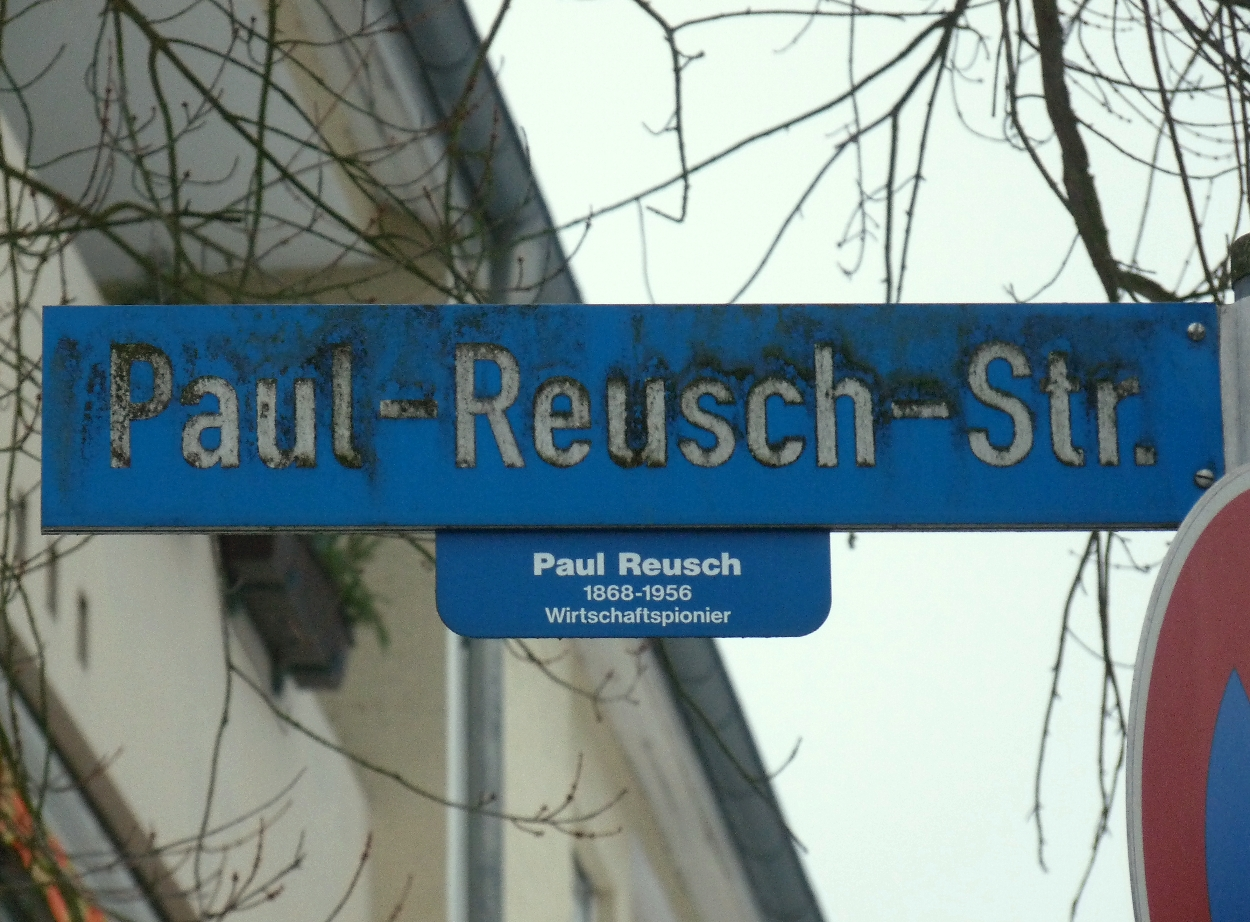 Nach Paul Reusch benannte Straße in Aalen